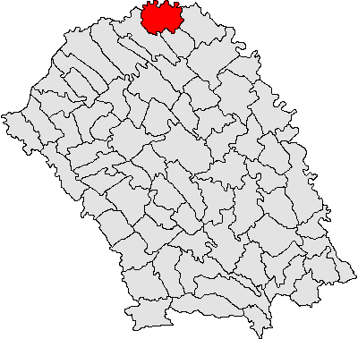 Categorie:Hărţi ale judeţului Botoşani